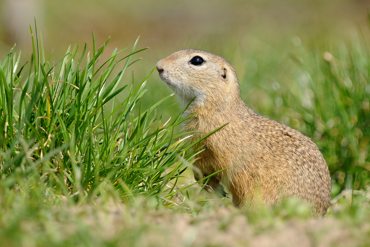 Suseł moręgowany